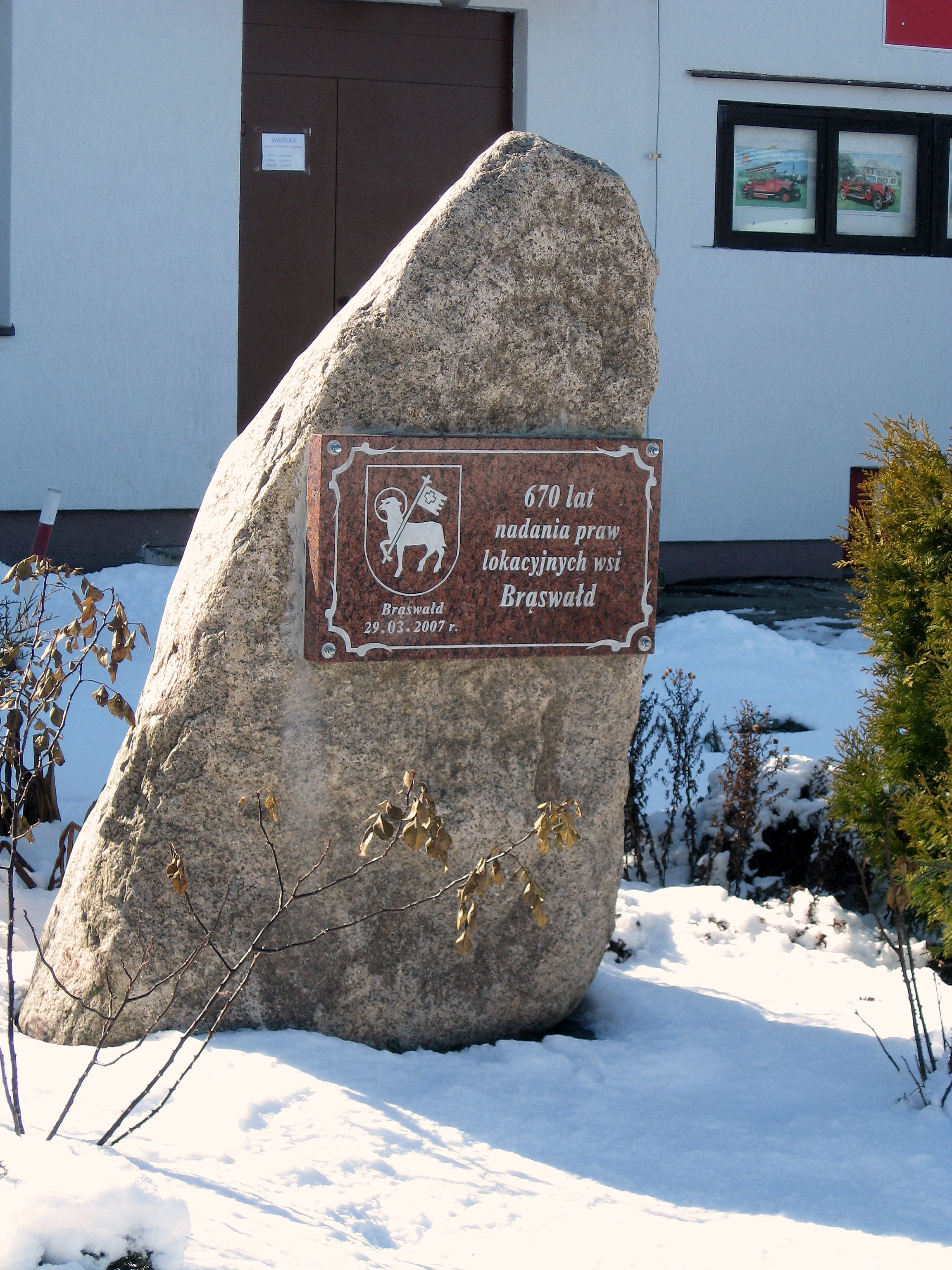 Tablica pamiątkowa 670-lecia lokacji Brąswałdu z 2007.